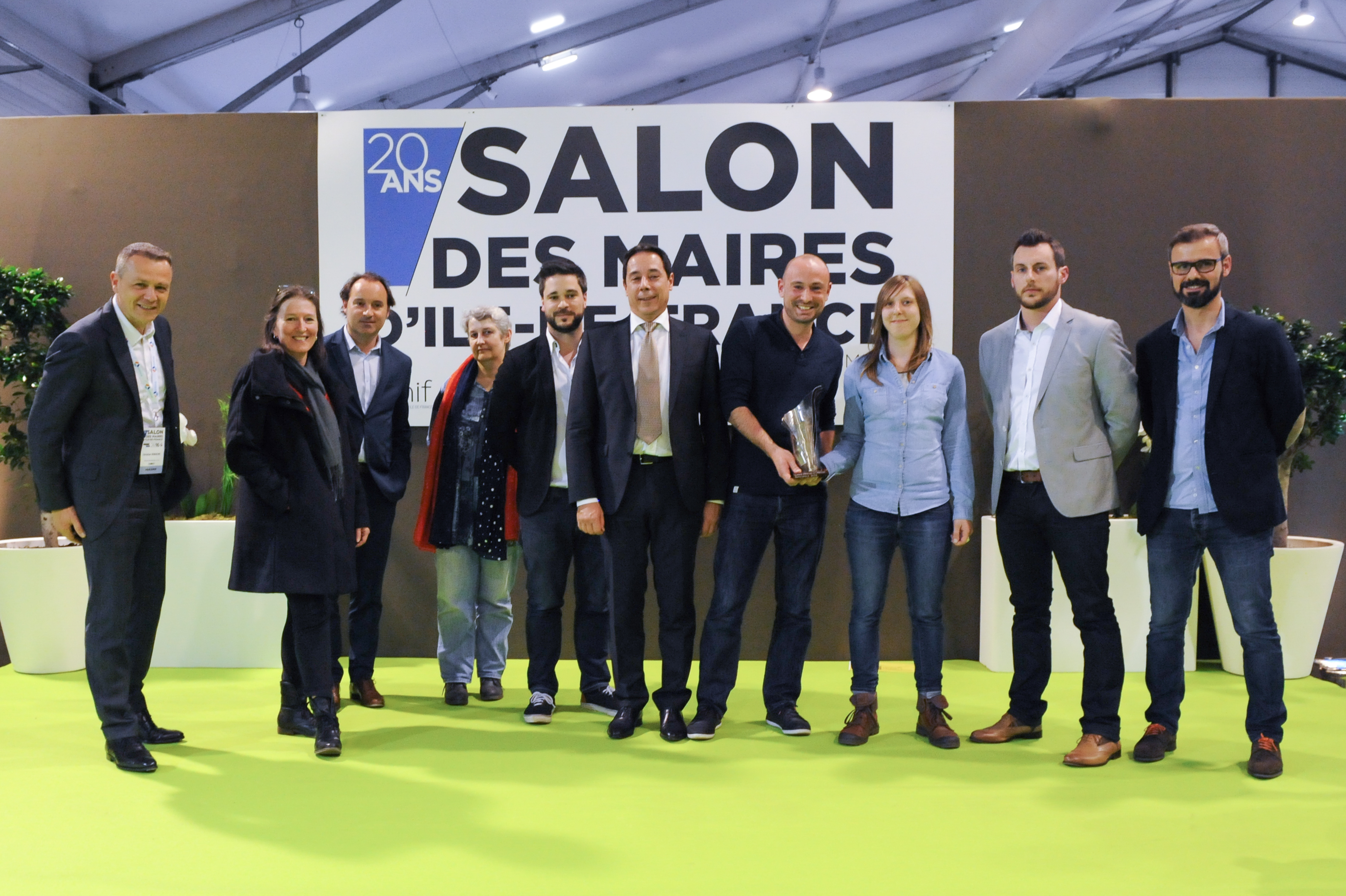 VILLE D'ARGENTEUIL De gauche à droite : Philippe Descrouet (maire de Serris et président du jury), Sophie Berlioz (maquettiste), Michael Brichet (directeur de la communication), Claudine Algret (rédactrice en chef adjointe), Samuel Degasne (responsable des publications et rédacteur en chef). Tenant le prix : Alexandre Rimond et Marianne Pollastro (photographes) Autres : membres du jury